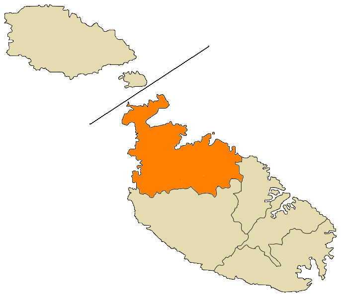 Mapa del Distrito del Norte, Malta.